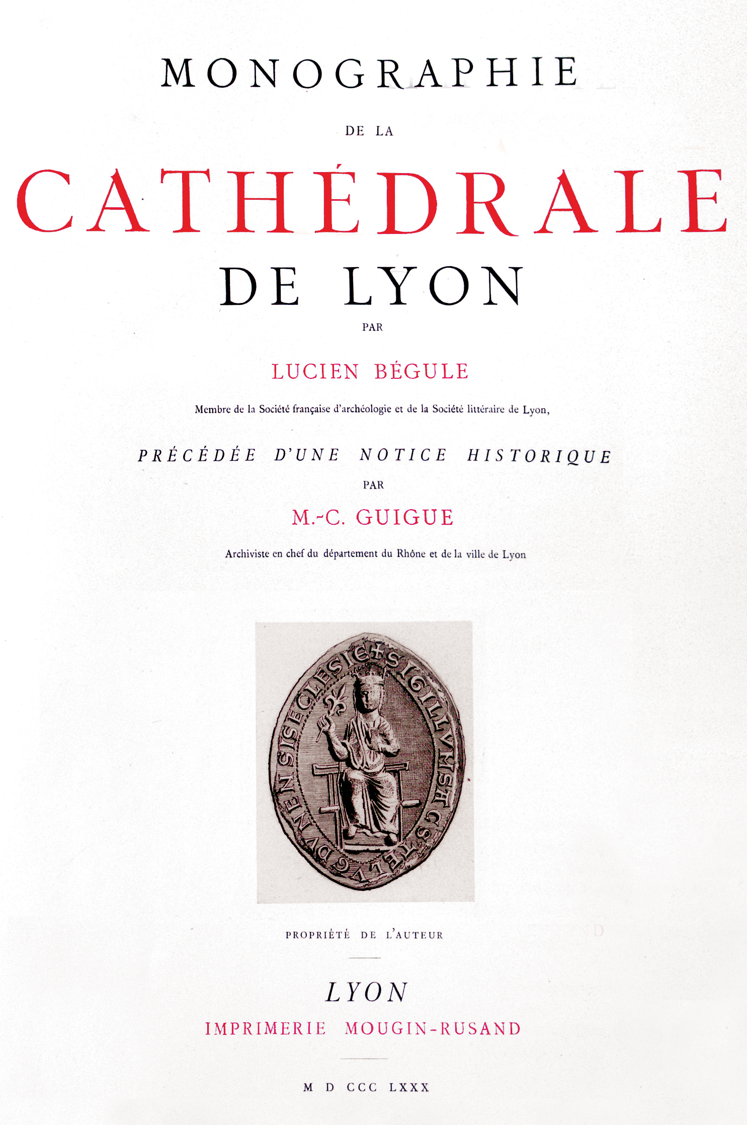 La monographie de la cathédrale de Lyon par Lucien Bégule